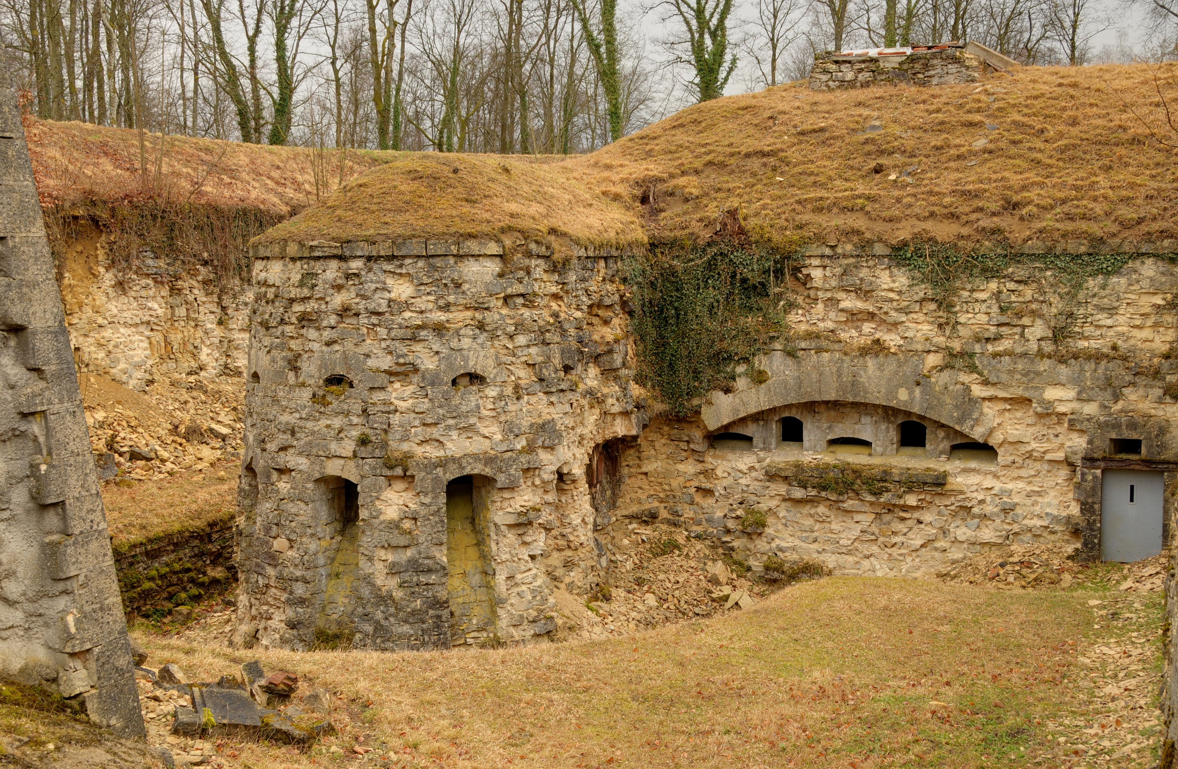 Caponnière simple visible de l'entrée principale. Bourlémont Fortifications (HDR).